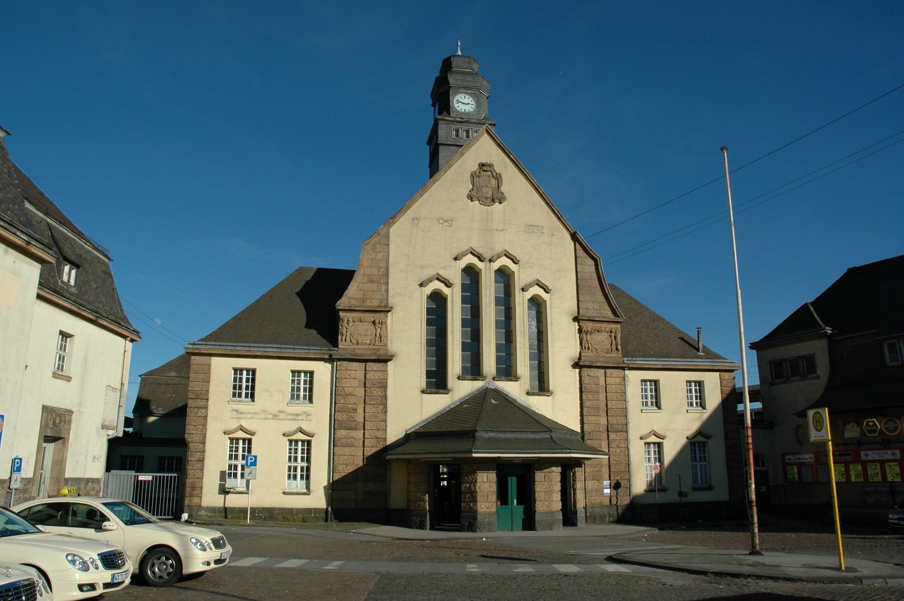 Wuppertal-Vohwinkel, Bahnhofsgebäude